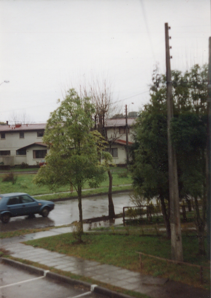 Villa San Pedro en invierno, calle Los Mañíos